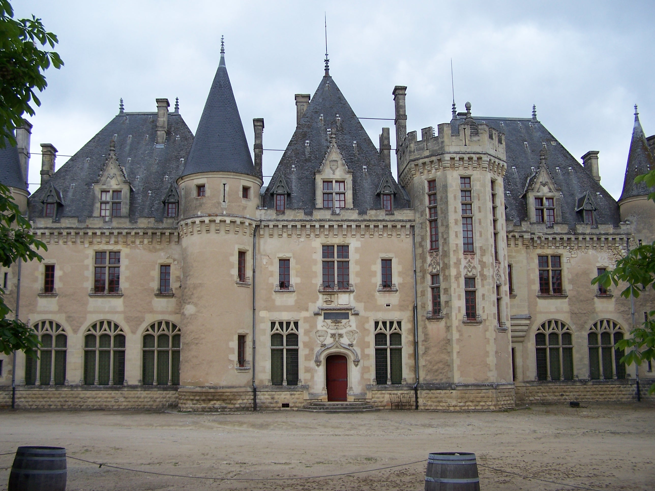 Château de Montaigne, façade est, cour intérieure, à Saint-Michel-de-Montaigne, Dordogne, France Object location44° 52′ 41.4″ N, 0° 01′ 48″ E